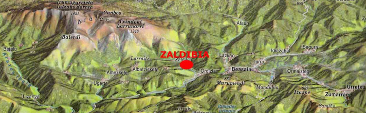 ZAPE ELkartearen Pottoka gunearen kokapena.